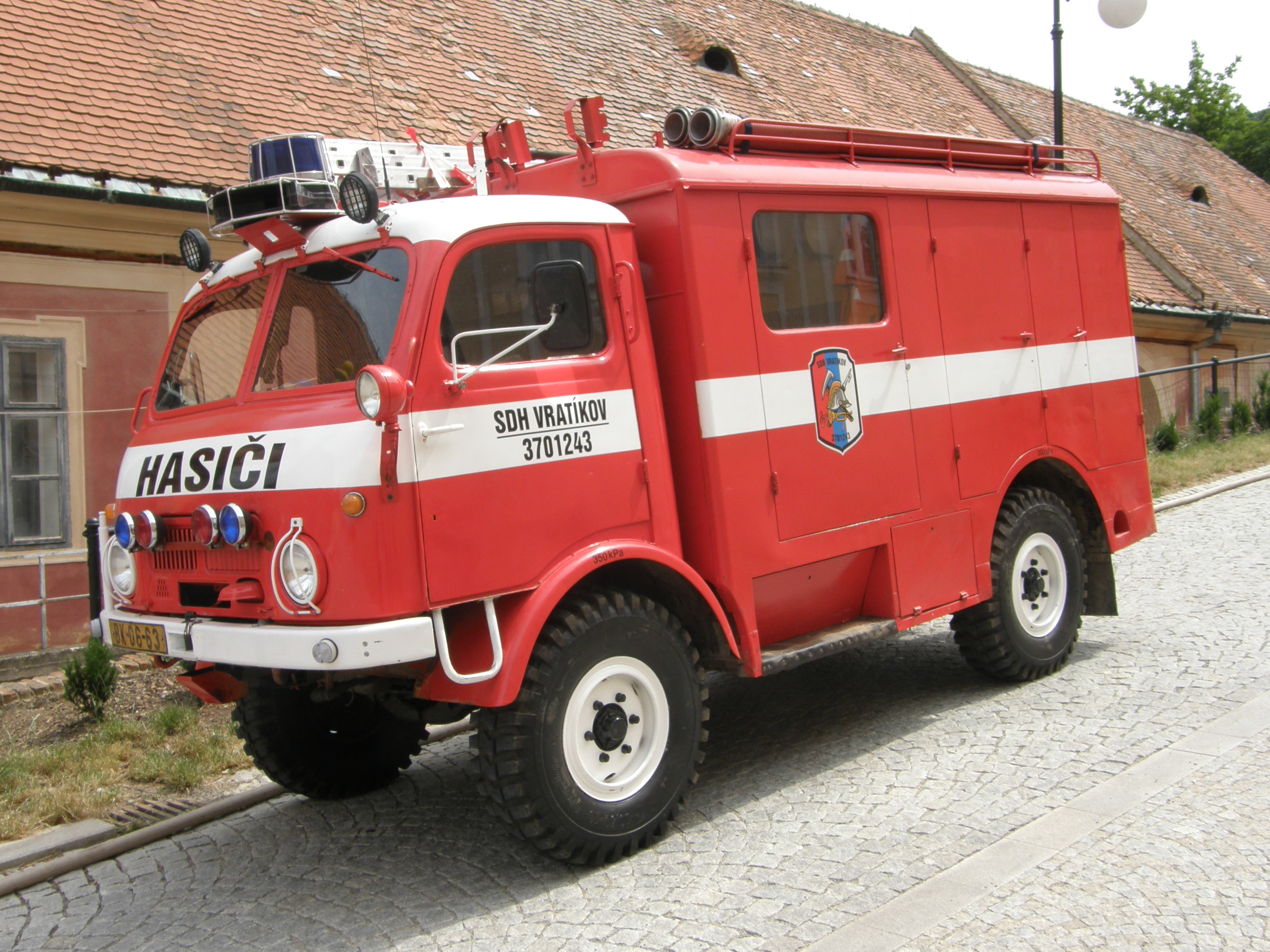 Vůz SDH Vratíkov